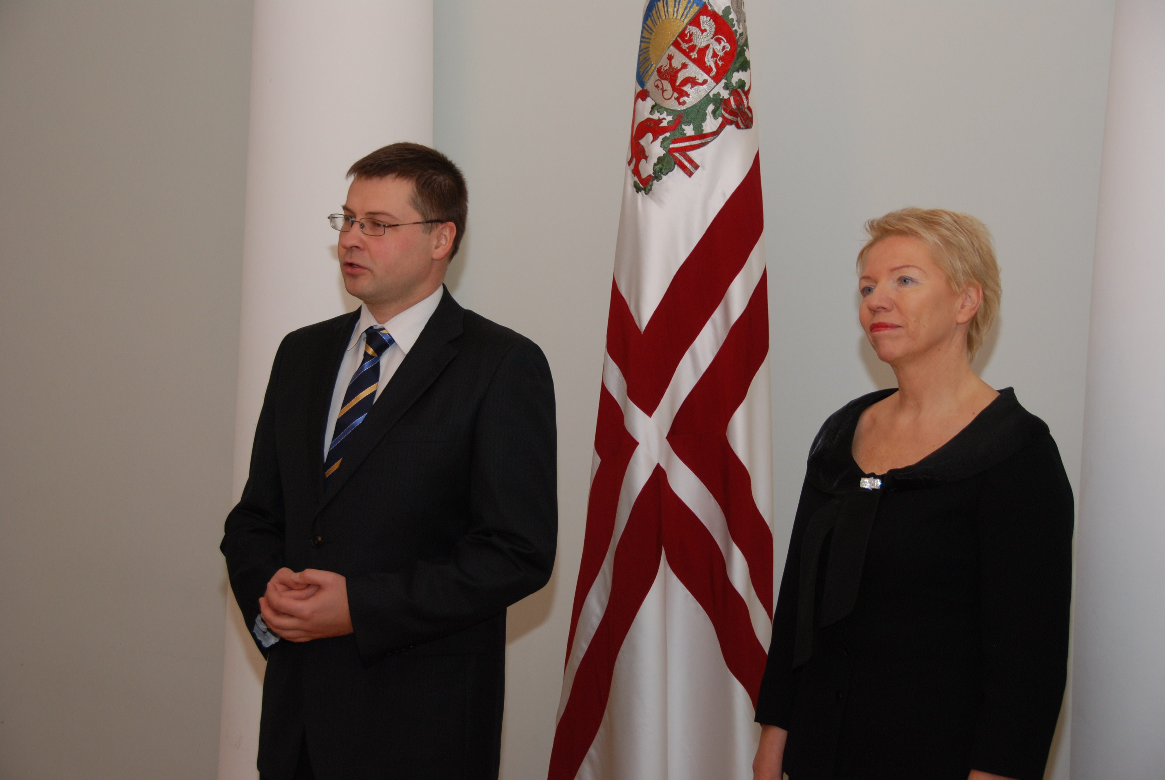 Ministru prezidents Valdis Dombrovskis un MK Apbalvošanas padomes priekšsēdētāja, izglītības un zinātnes ministre Tatjana Koķe Foto: Aivis Freidenfelds, Valsts kanceleja